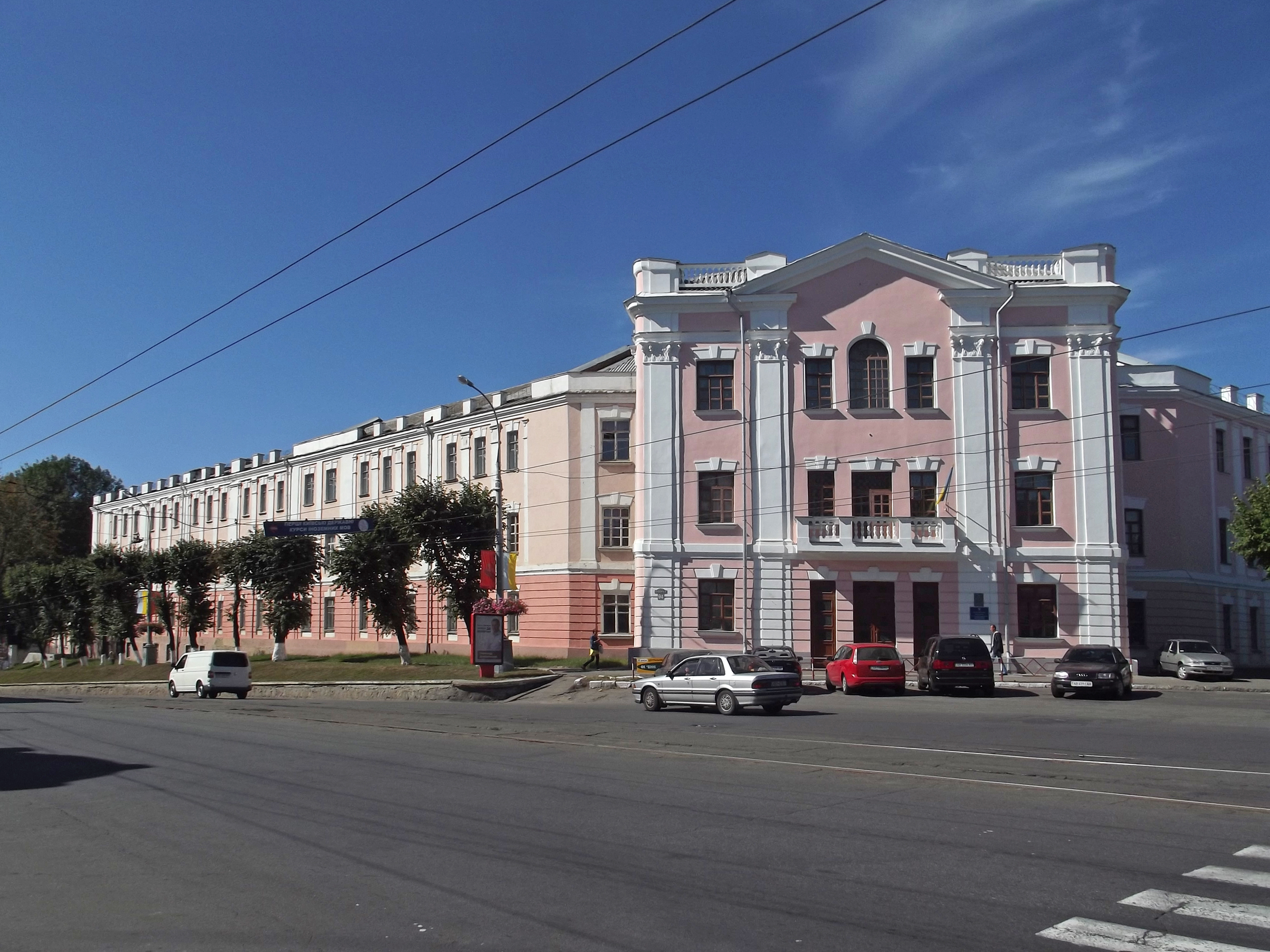 Здание бывшей женской гимназии